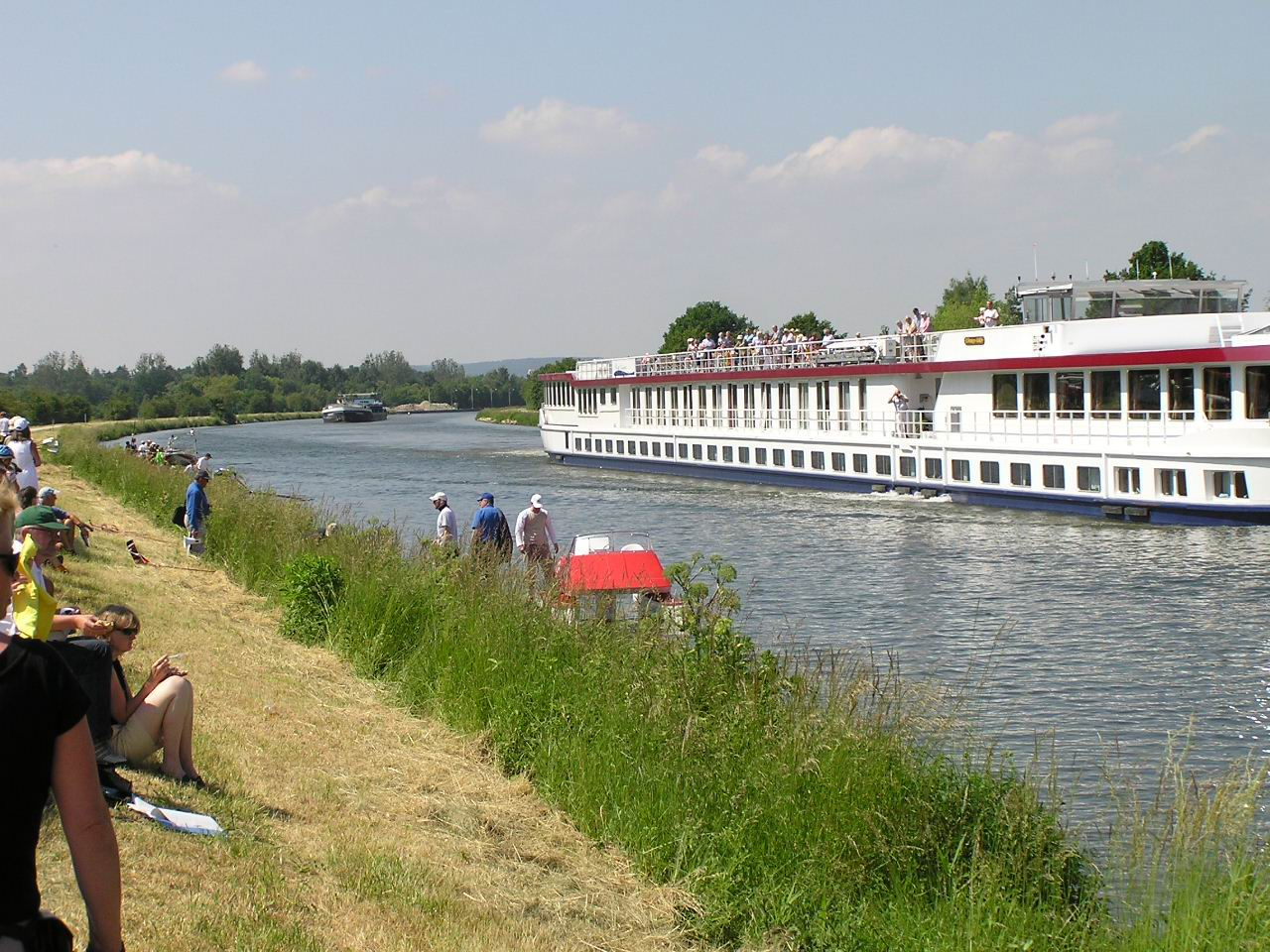 Main-Donau-Kanal bei Bamberg